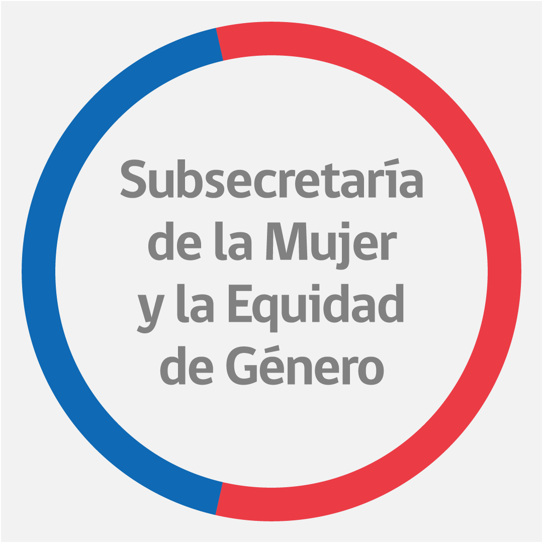 Logo de la Subsecretaría de la Mujer y la Equidad de Género